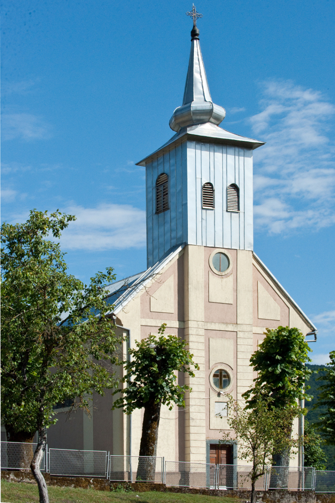 Župna crkva Majke Božje Karmelske u Kuterevu